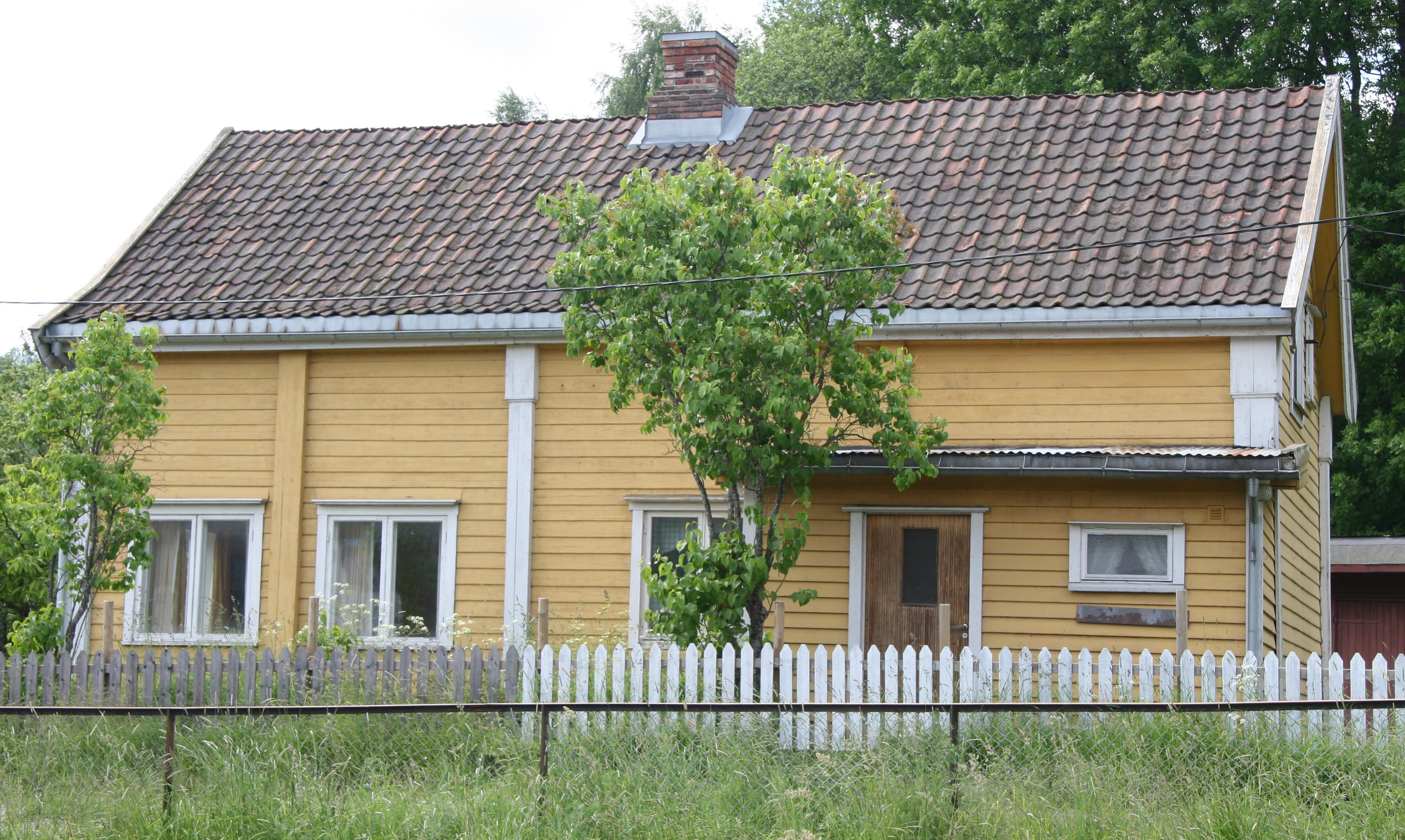 Amundstua på Mjøssamlingene, Eidsvoll